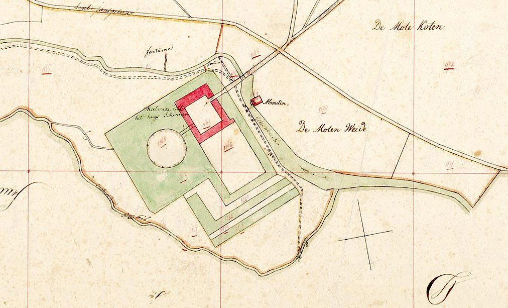 Chateau dit Huijs (Huis Terborg) gemeente Schinnen met fontaine (bron) en Moulin (molen) aan de Geleenbeeck. Kadasterkaart ca 1822 Gemeente Schinnen Sectie H 3e blad genaamd Sweijckhuisen. Getekend door Diederen Geomètre (landmeter) 2e Classe. Bron: Digitale bewerking: Ed Stevenhagen.